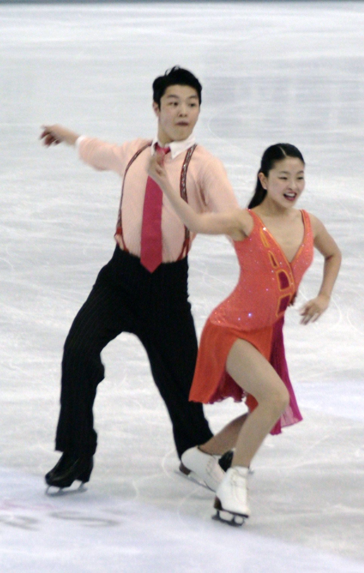 Майя Шибутани и Алекс Шибутани (США) на чемпионате мира по фигурному катанию 2012